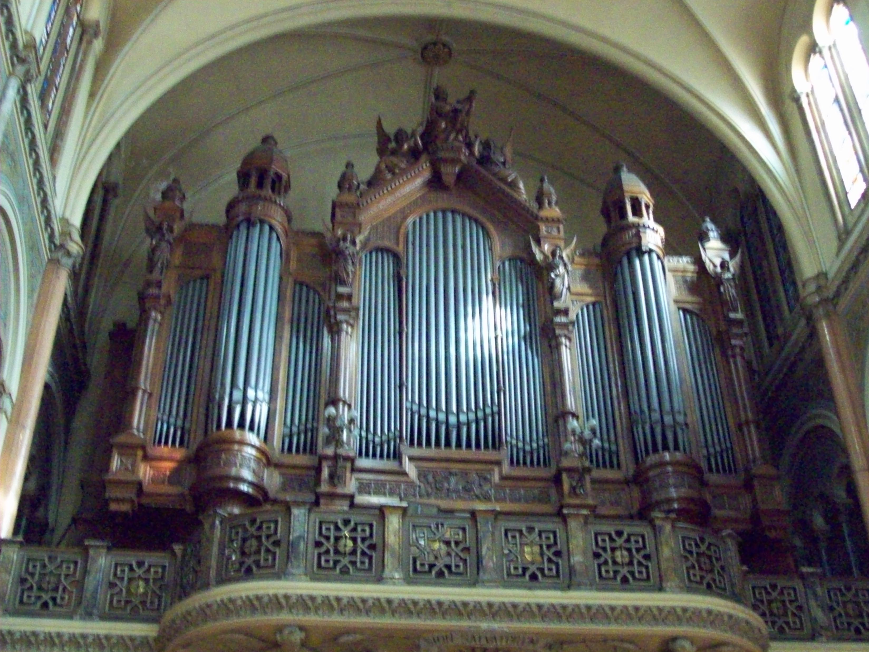 Basílica del Santísimo Sacramento - Retiro, ciudad de Buenos Aires, Argentina.